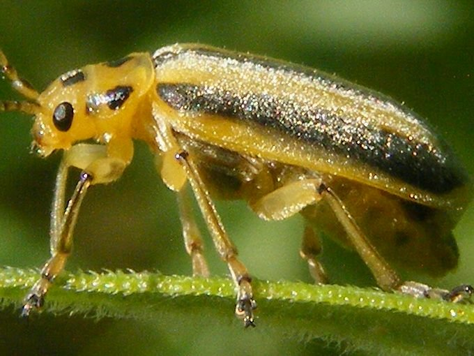 Trirhabda canadensis (Chrysomèle à quatre bandes)